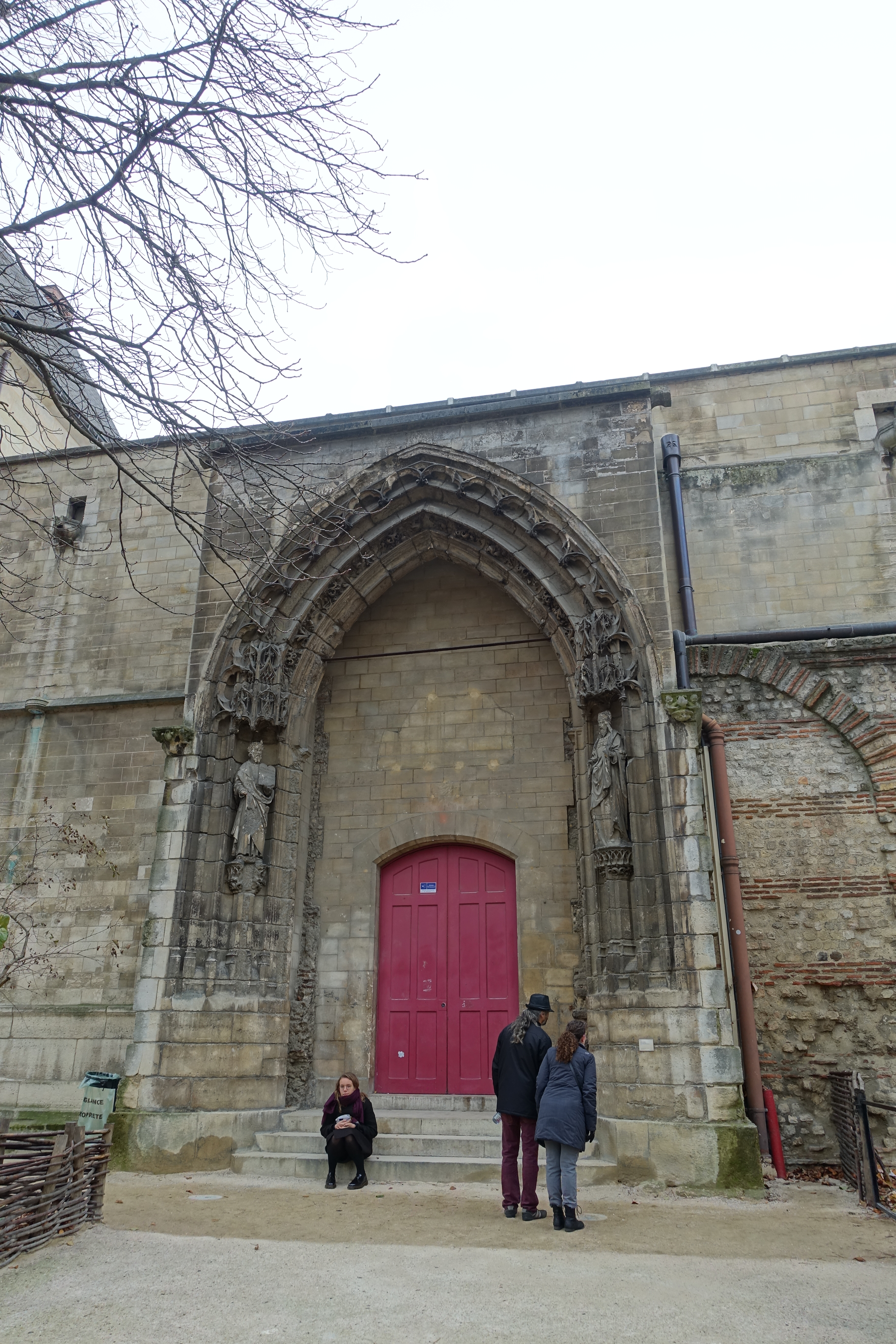 Jardin Médiéval de Cluny @ Paris